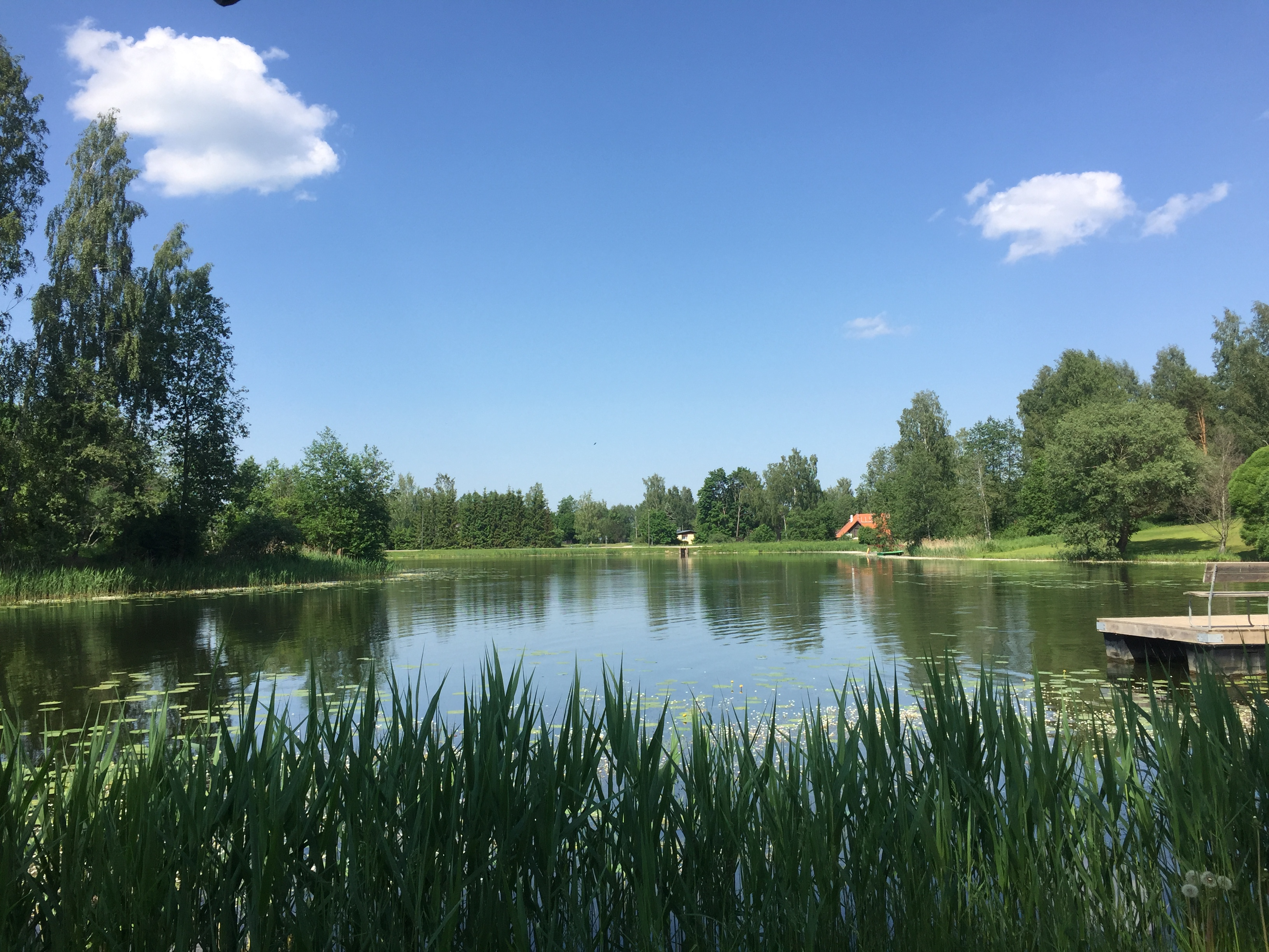 Melliste järv supelranna poolt vaadatuna